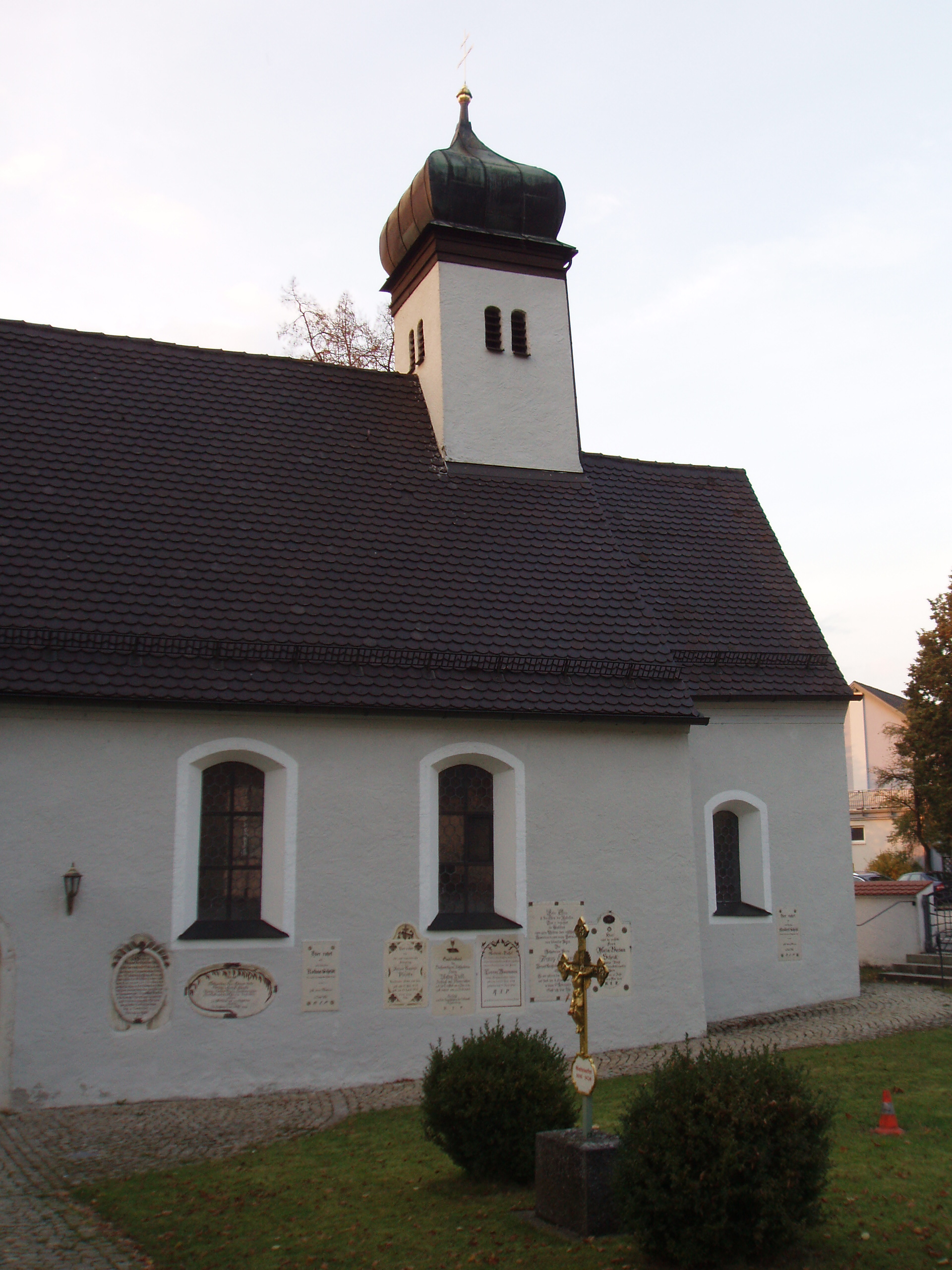 Kipfenberg im Landkreis Eichstätt Kirche St. Georg